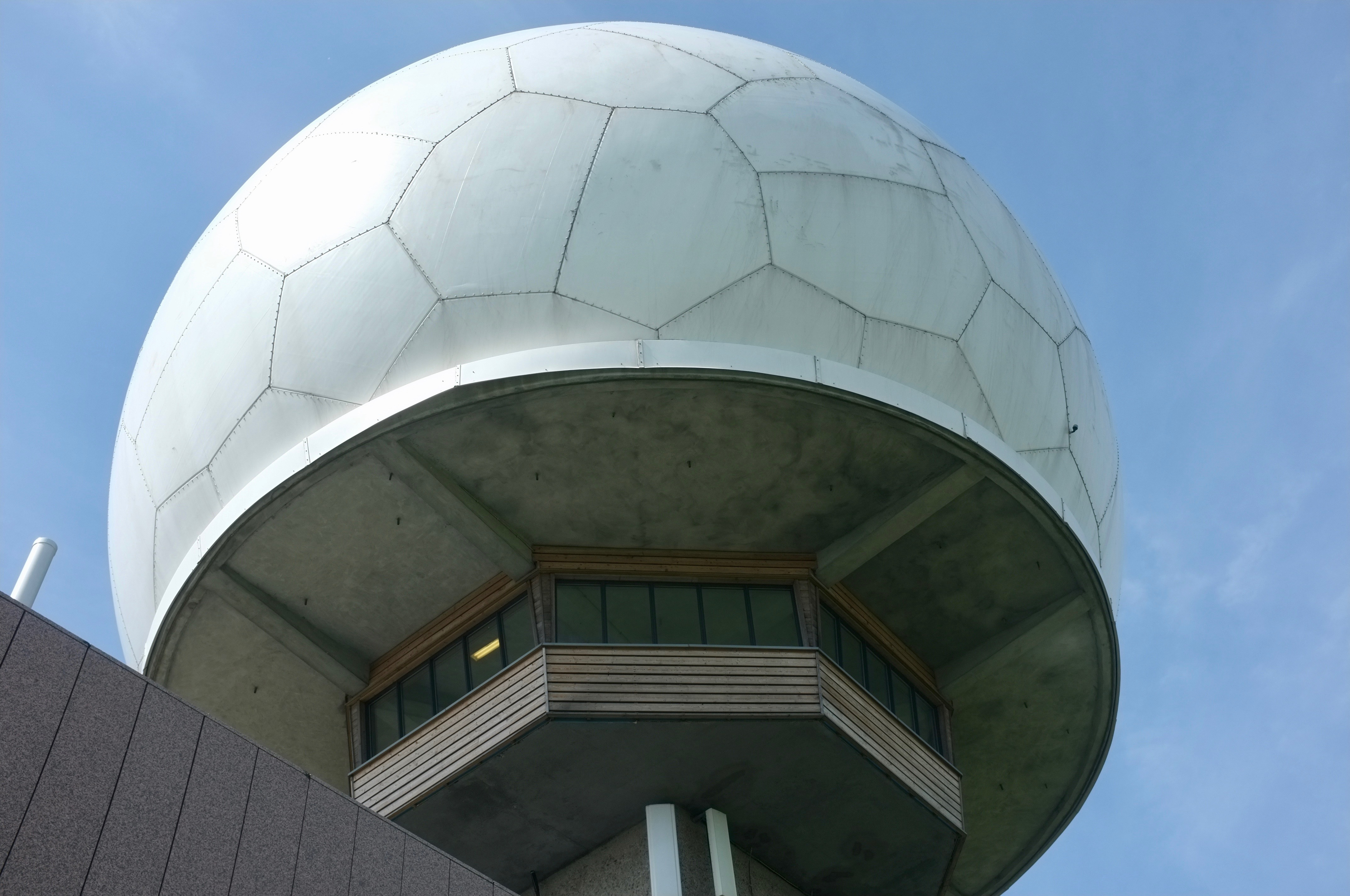 Radaren på Haukåsen i Østmarka i Oslo.